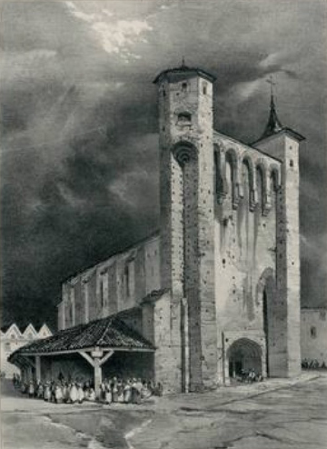 Lithographie représentant la Collégiale Notre Dame du Camp à Pamiers